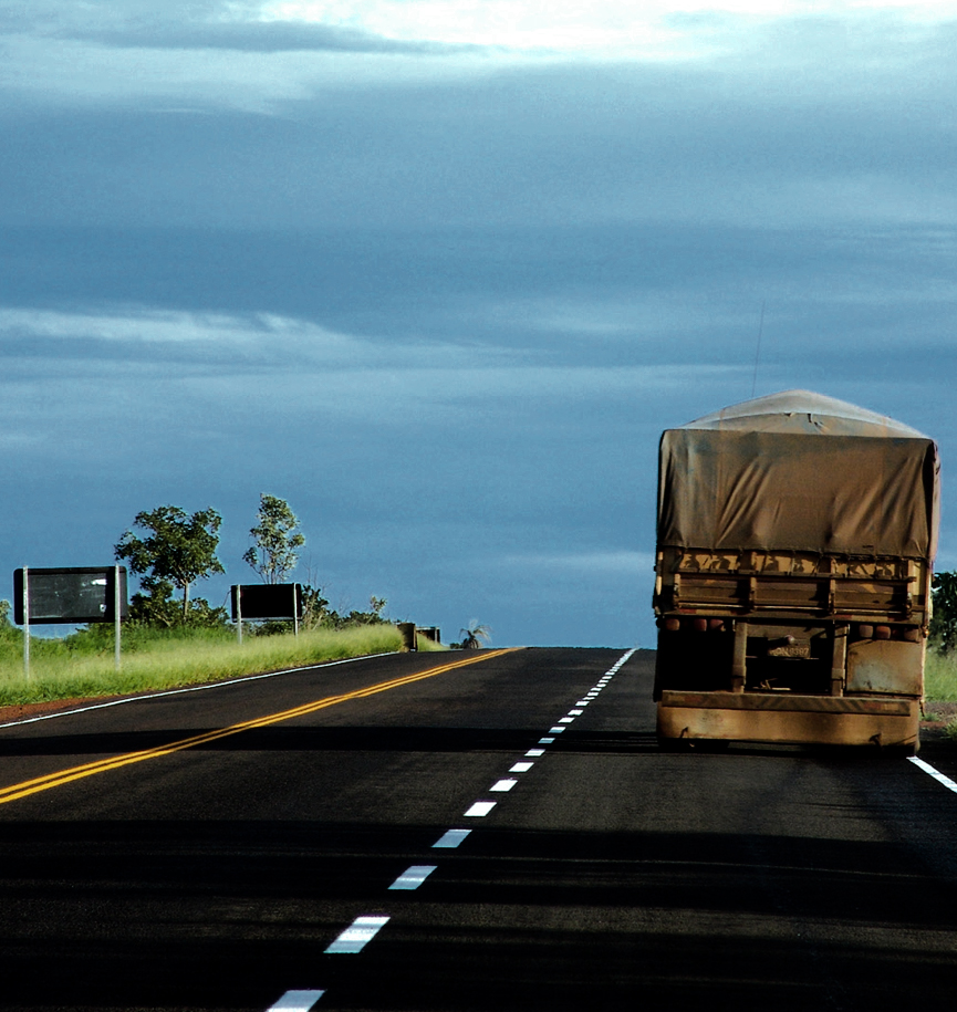 Uma rodovia brasileira.